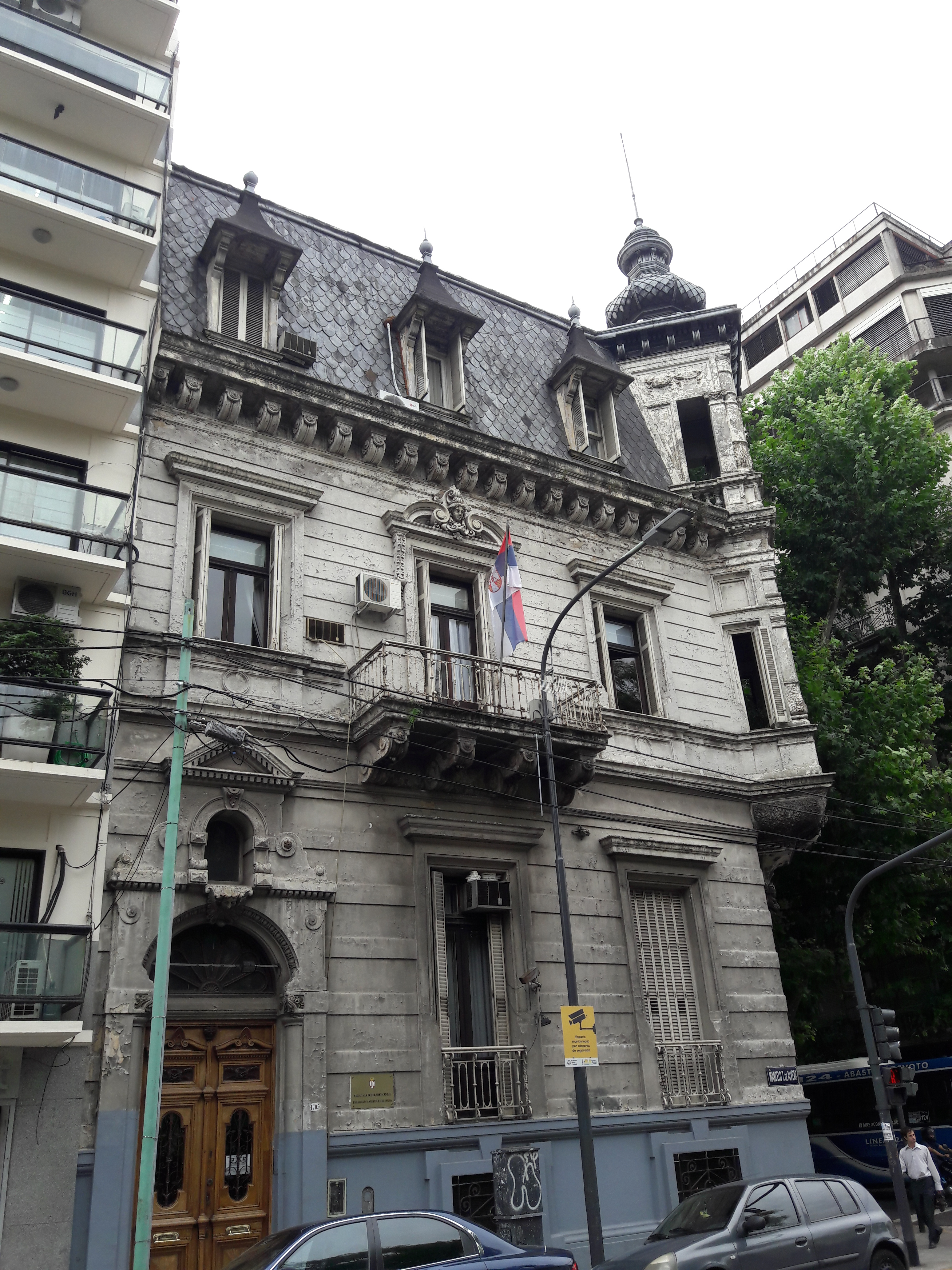 Embajada de Serbia, Recoleta, Buenos Aires, Argentina.